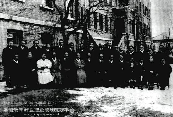 1935년 2월 17일, 조선기독교감리회총리원 이사회, 앞줄 왼쪽에서 일곱번째가 윤치호, 여덟번째가 양주삼, 맨앞줄 오른쪽 맨끝이 김활란, 오른쪽 두번째가 차미리사, 네번째가 박인덕, 다섯번째가 신흥우